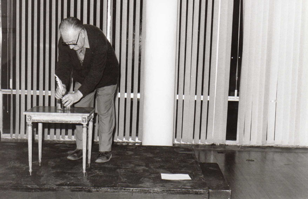 Joan Brossa en un acte de la trobada de poetes al Museu de Arte Moderna do Rio de Janeiro Col·lecció MACBA. Centre d’Estudis i Documentació. Fons Joan Brossa